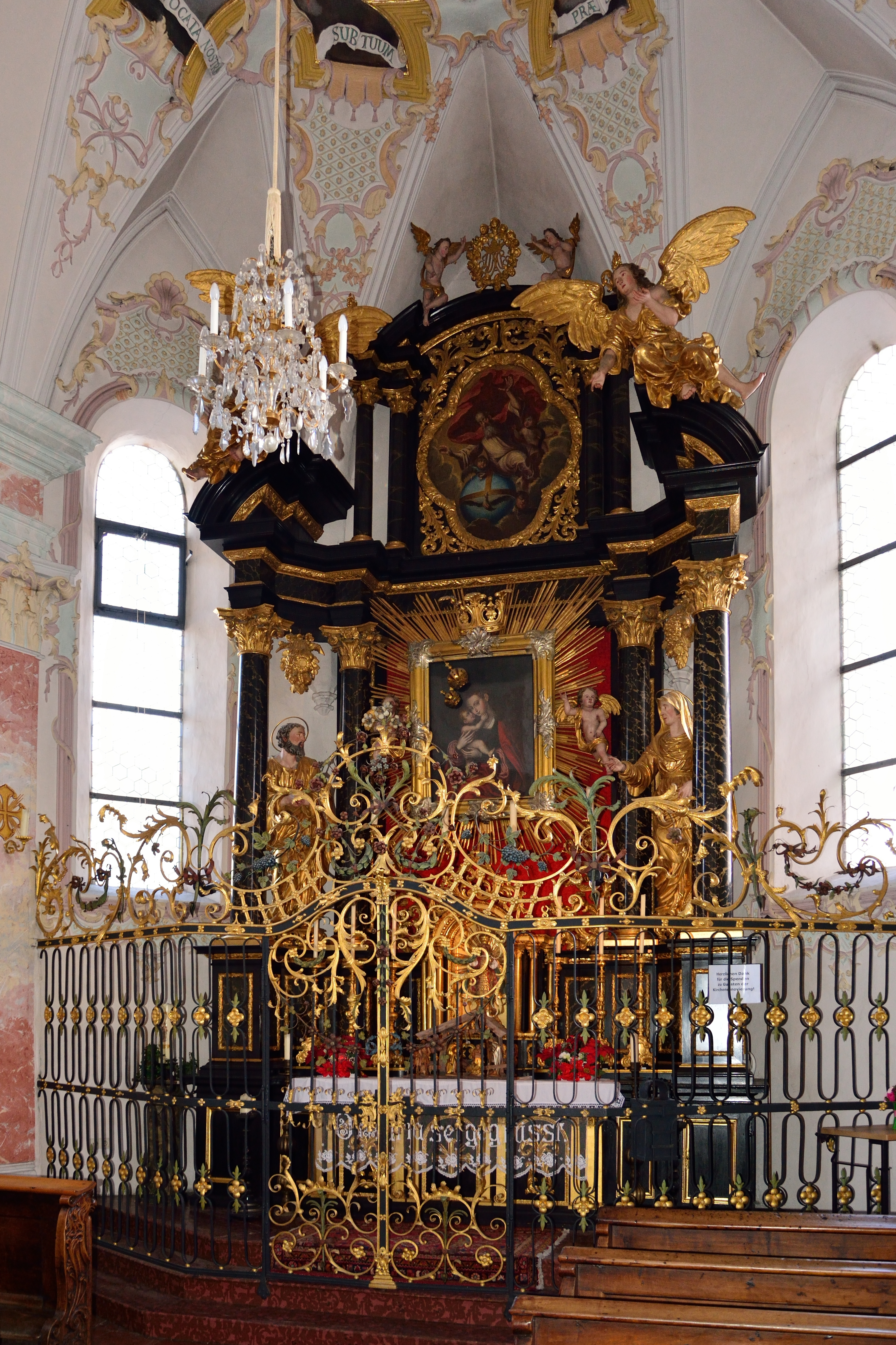 Altar der Liebfrauenkirche in Kitzbühel von Georg Faistenberger (1702) mit der Kopie des Cranach-Bildes Maria Hilf. Davor Rosengitter von Franz Witting (1778).